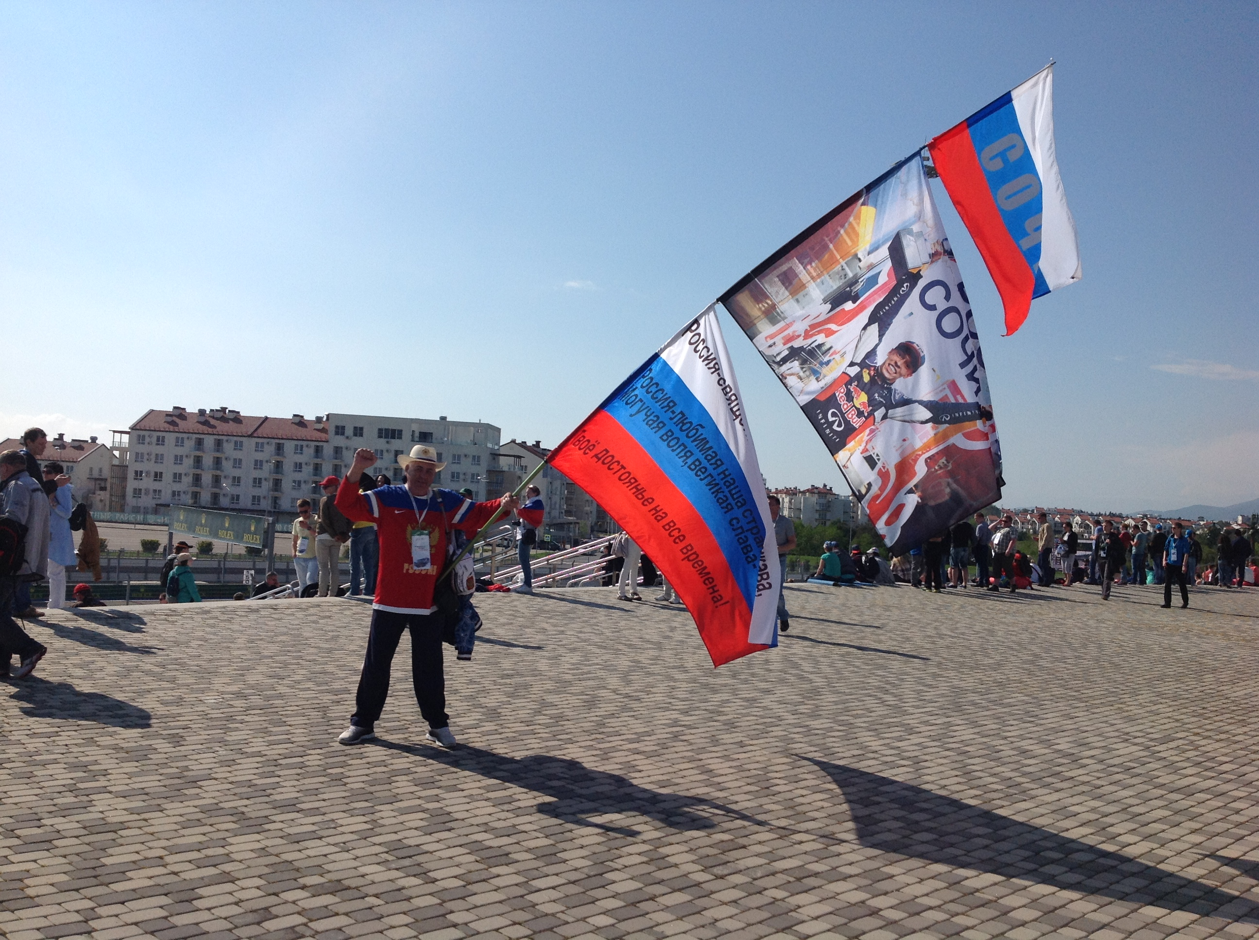 Формула-1 в Сочи, 2016 год - российский фанат гонок из Сочи